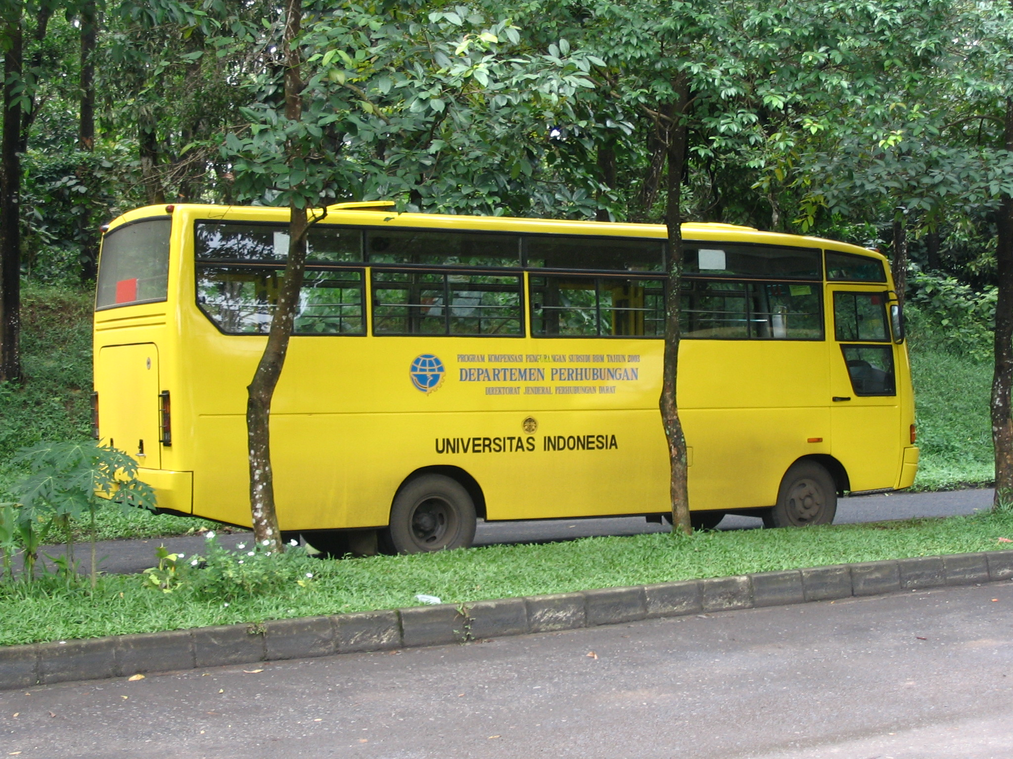 Servicio de transporte de bus dentro del Campus de Depok, Universidad de Indonesia.